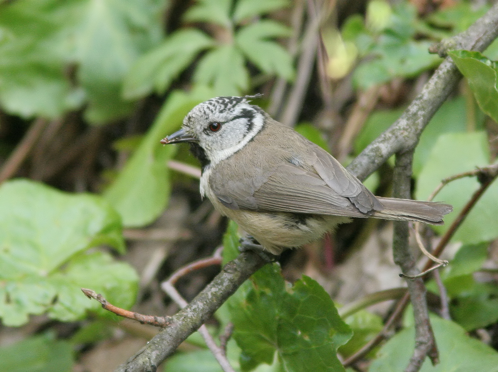 Parus cristatus in Lasy Janowskie, Poland